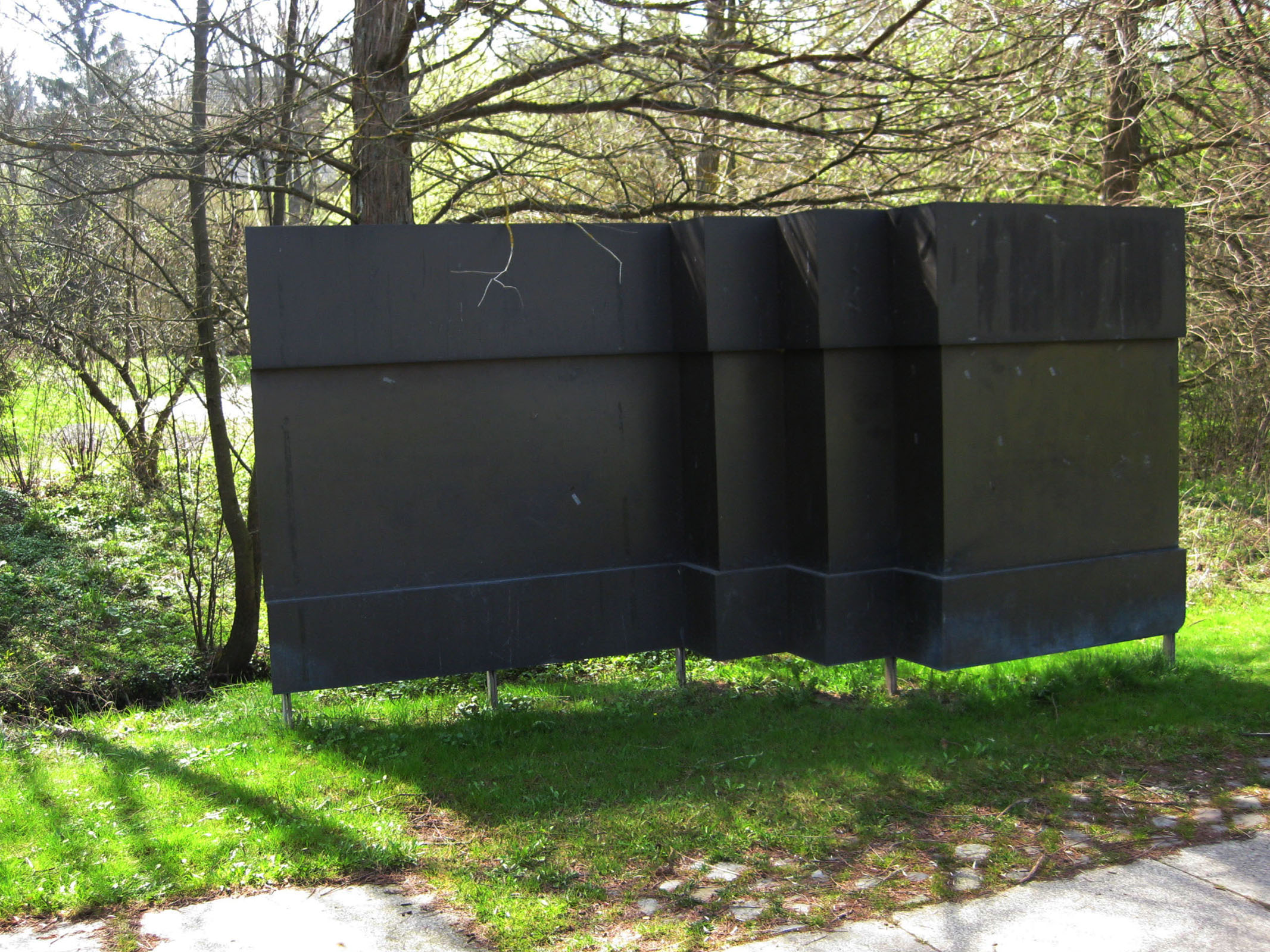 Jo Schöpfer, Paravent, 1989, Sommerhofental, Sindelfingen, Deutschland